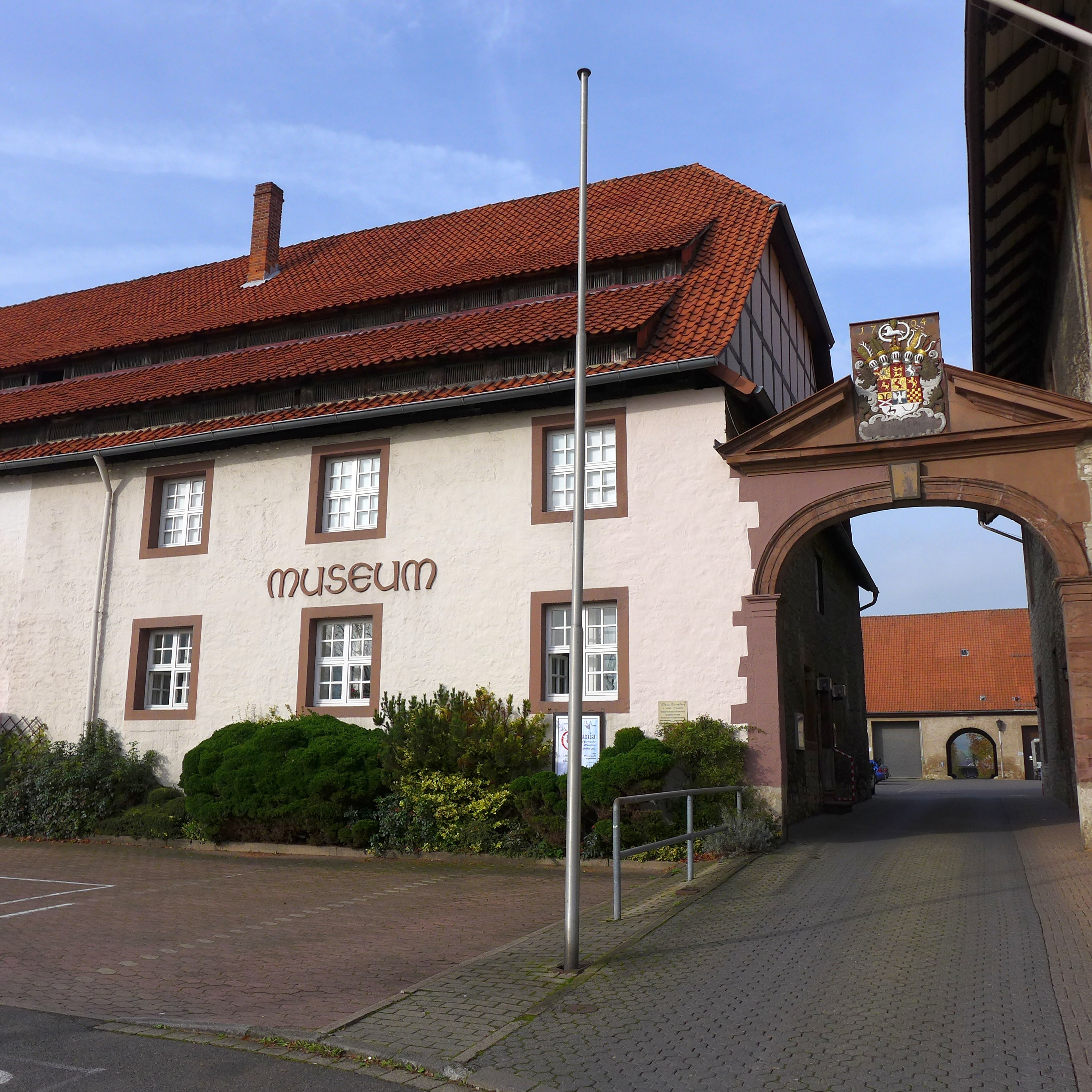 Heimatmuseum